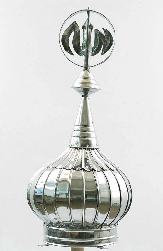 Moskee (onderdeel). De moskeetop is gemaakt in Semarang, Midden-Java, en langs de weg gekocht in Serpong, ten oosten van Jakarta. De Arabische letters in de cirkel bovenop vertolken de naam van Allah. In Indonesie zijn tegenwoordig een aantal typen van toppen of pieken te zien op moskeeen. - een uivormig model met in de punt de naam van Allah (God) - een uivormig model met in de punt de Islamitische halve maan - een gegolfde pyramide vorm (zoals 6148-3a) met in de punt de naam van Allah (God) - een gegolfde pyramide vorm met in de punt de Islamitische halve maan. Ze zijn alle gemaakt van roestvrij staal (RVS). Een stad waar ze gemaakt worden is Semarang in Midden-Java.. Roestvrij stalen top van een moskee